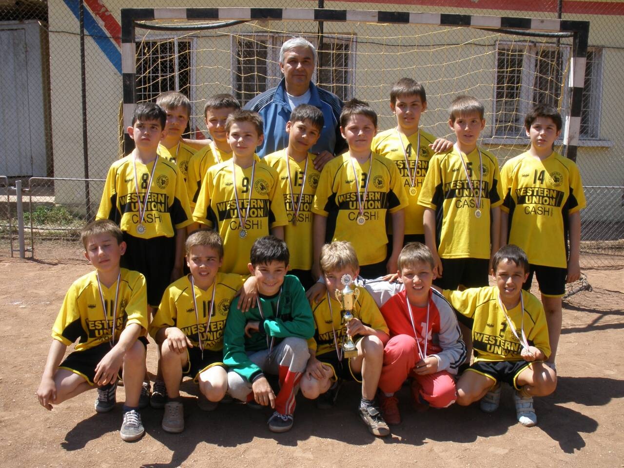 Вицешампион на България, ХК “Кубрат”, деца до 13г.